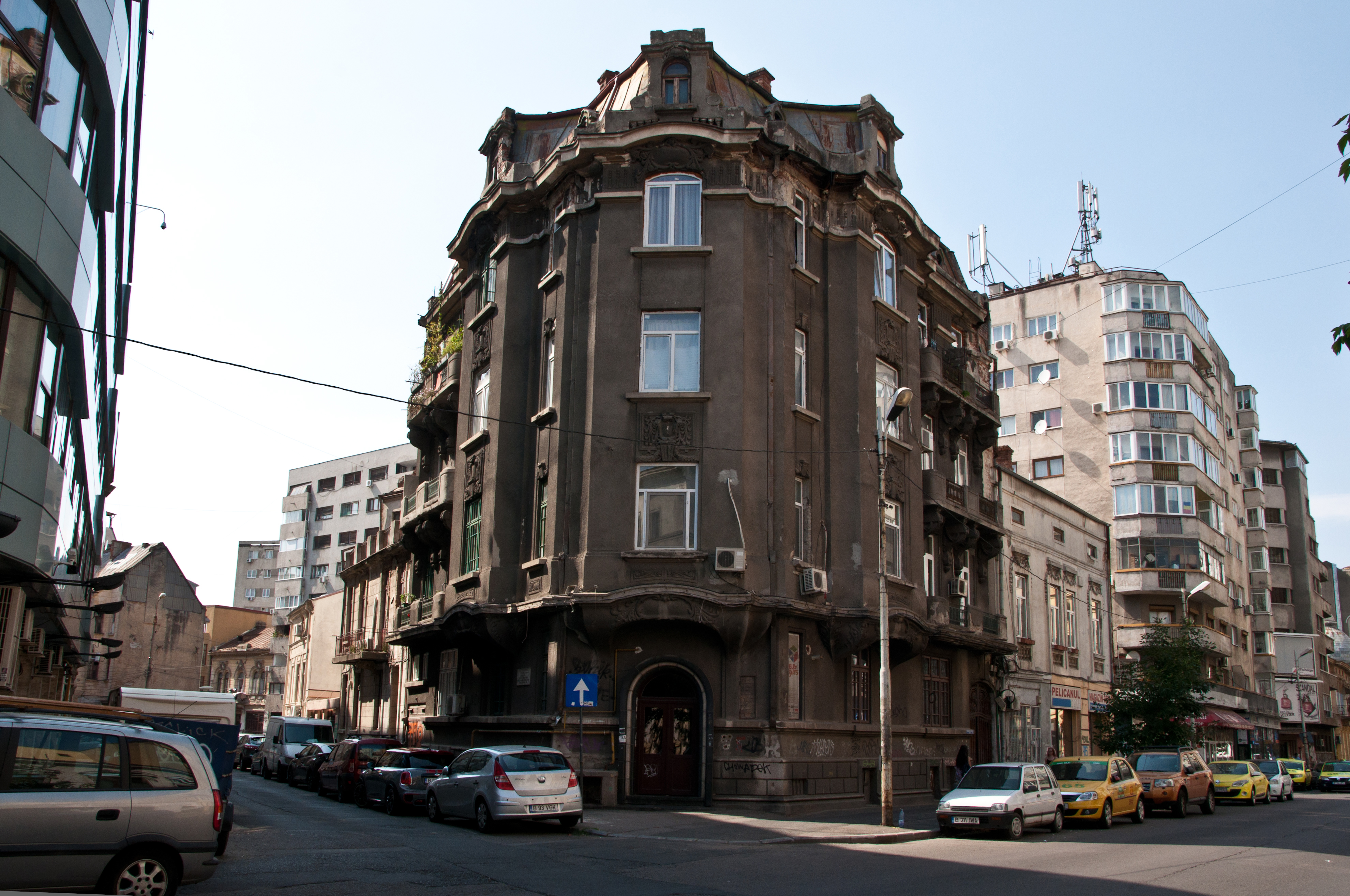 Imobil - Bd. Botev Hristo 14